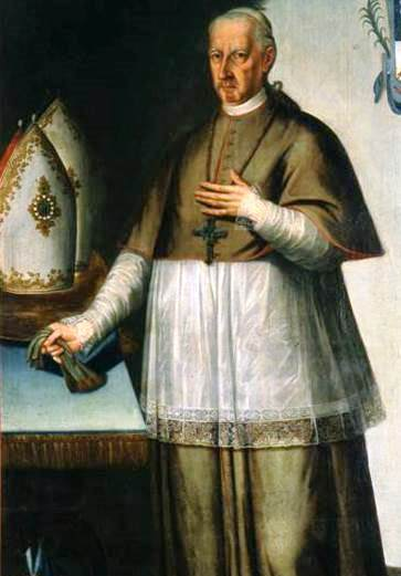 Detalle ampliado del retrato oficial de José de Cuero y Caicedo, obispo de Quito (1801-1815) y presidente del Estado de Quito (1811-1812).